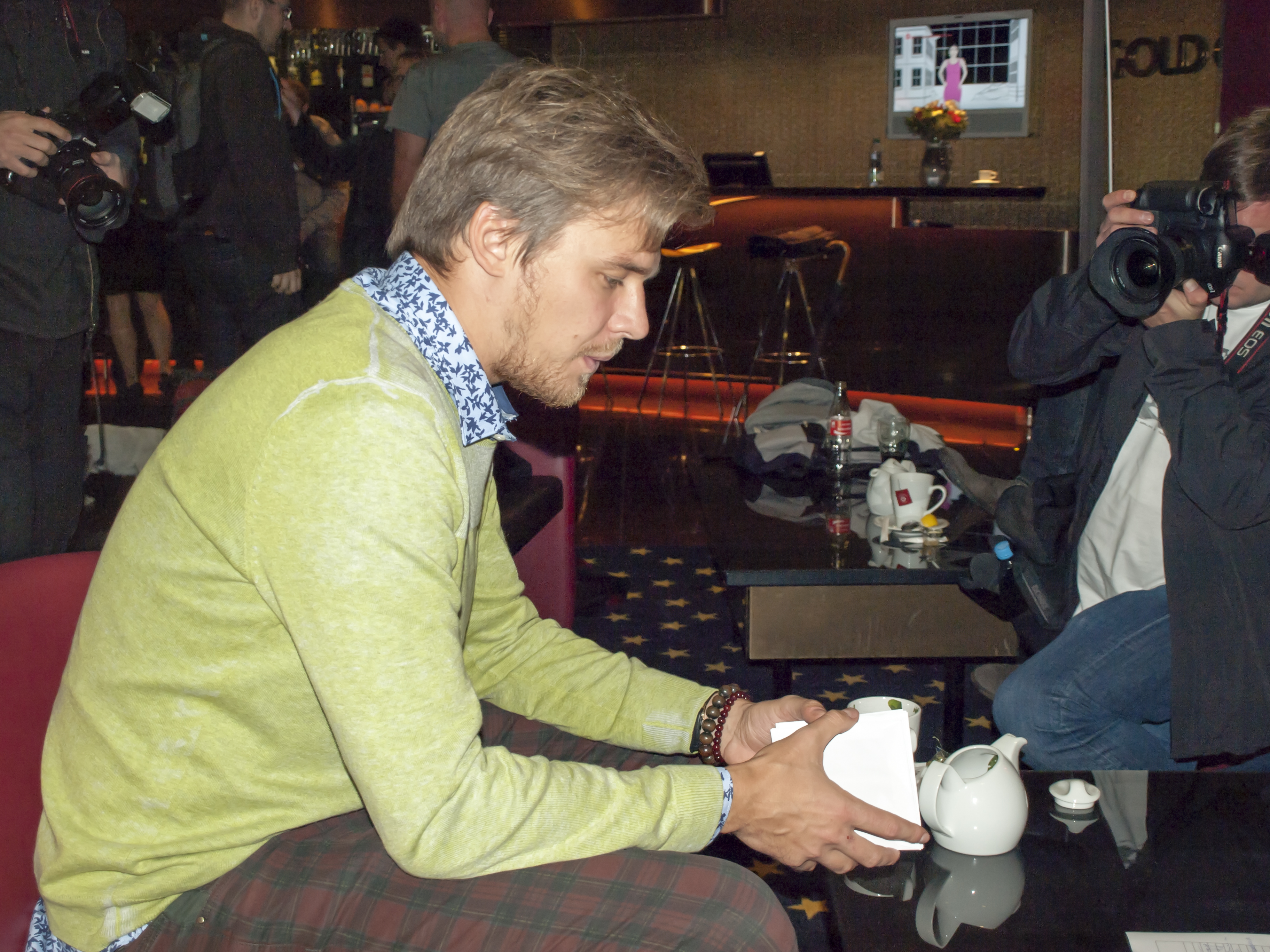 Fotky z novinářské konference 15.9.2015. Autor: Blanka Borová (Karolína Černá) pro Kritiky.cz & [ 10Mpix.cz